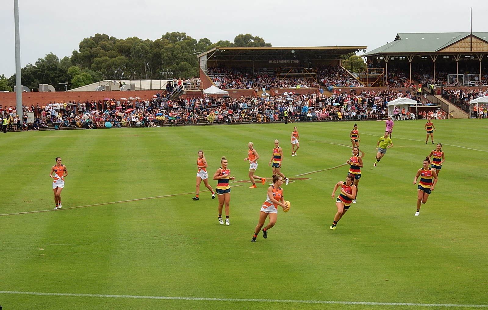 Adelaide vs GWS, 2017 AFLW season